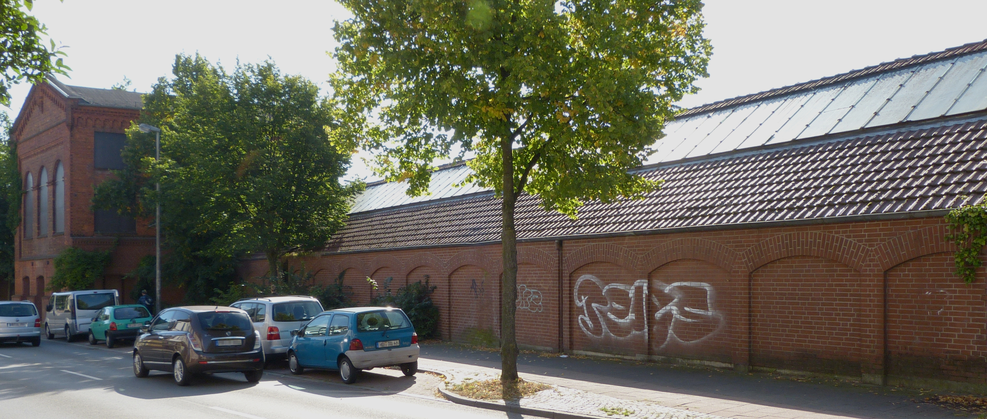 Bremer Wollkämmerei, Haus 12 und 81, Maschinenhaus E und Nadelsetzerei in Bremen, Landrat-Christians-Straße 95Das abgebildete Objekt ist ein geschütztes Kulturdenkmal in der Freien Hansestadt Bremen, mit der Nr. 2018 beim Landesamt für Denkmalpflege registriert.